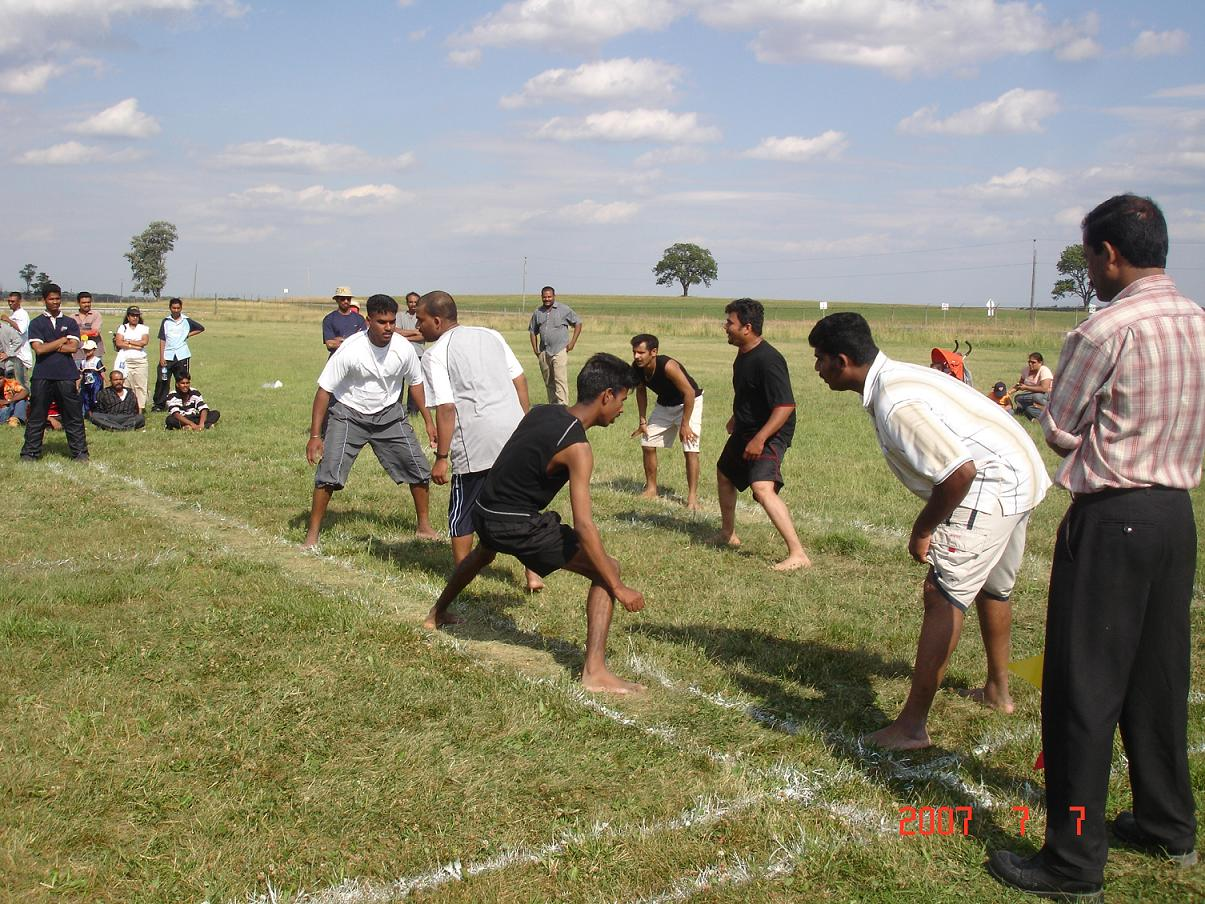 Template:வார்ப்புரு:GFDL Picture taken by Nat.